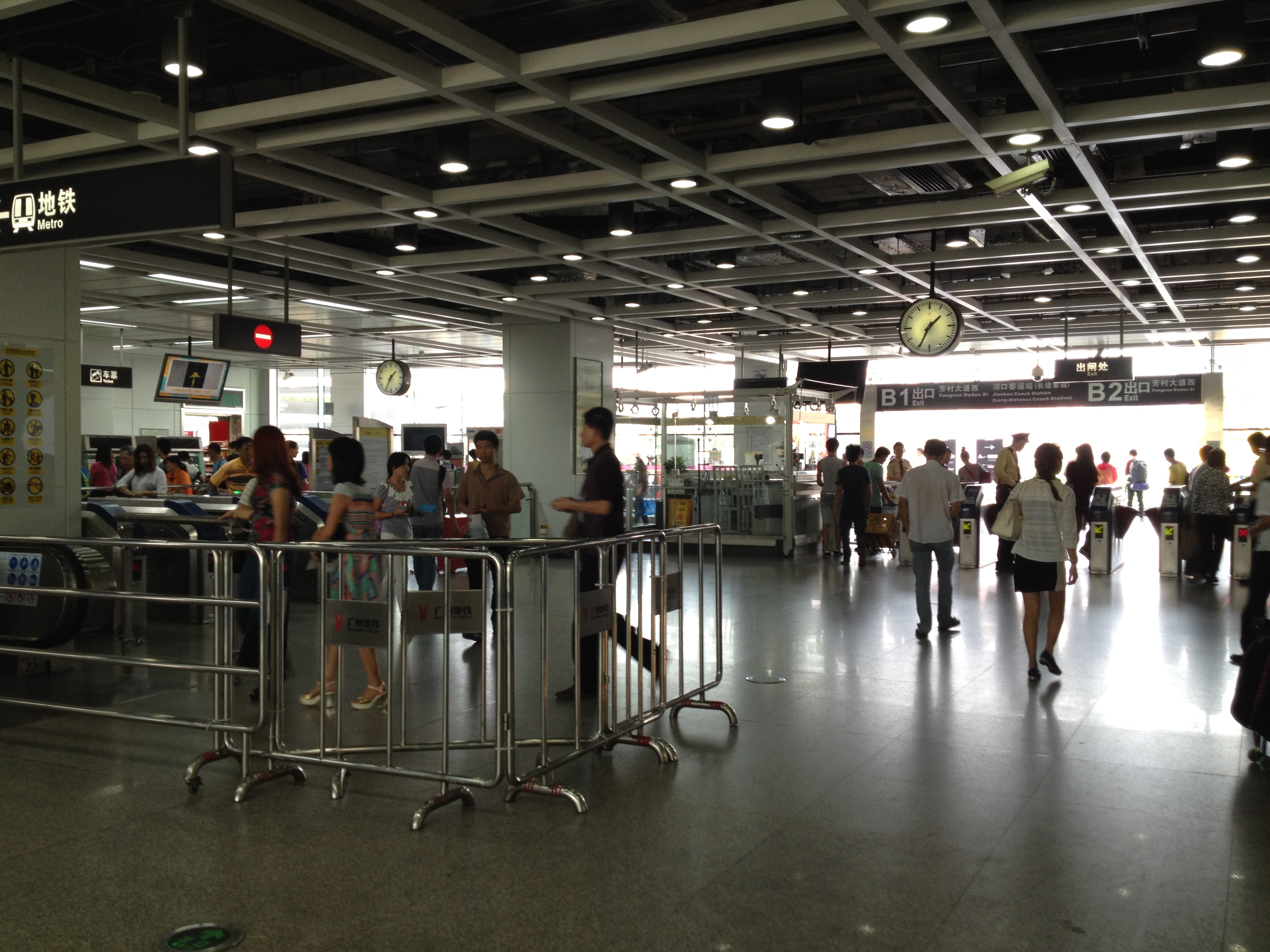 广州地铁滘口站站厅